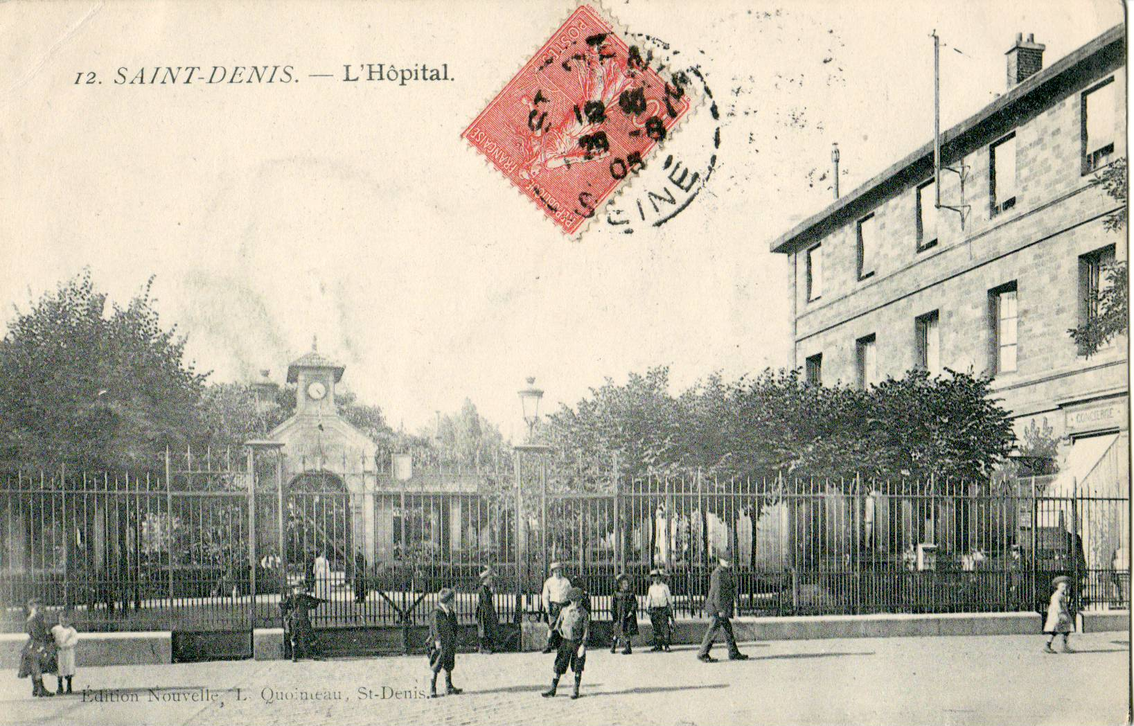 Carte postale ancienne éditée par Quointeau, N°12L'Hôpital Casanava à Saint-Denis, Seine-Saint-Denis